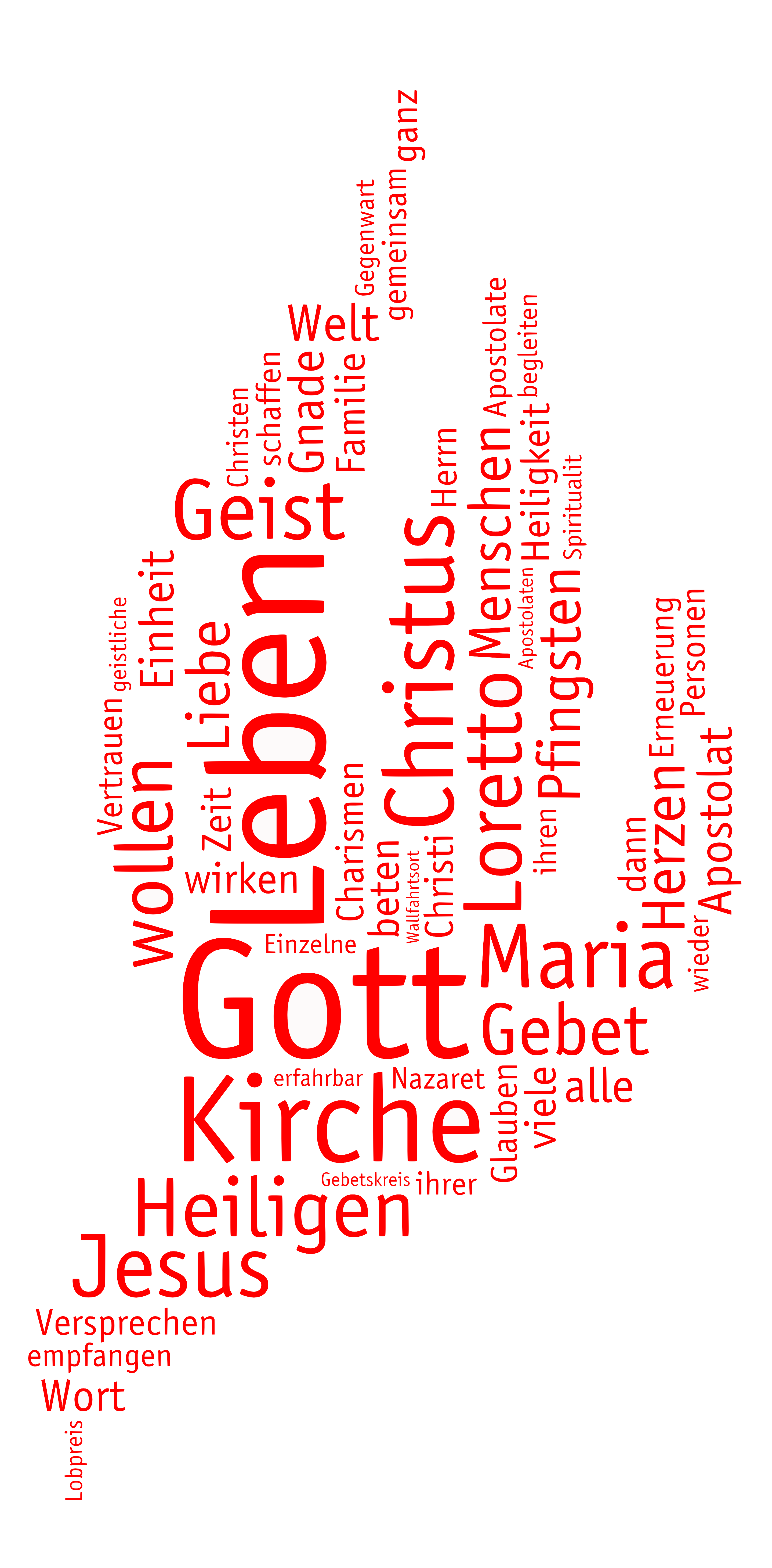 Loretto-Taube aus Schlagwörtern